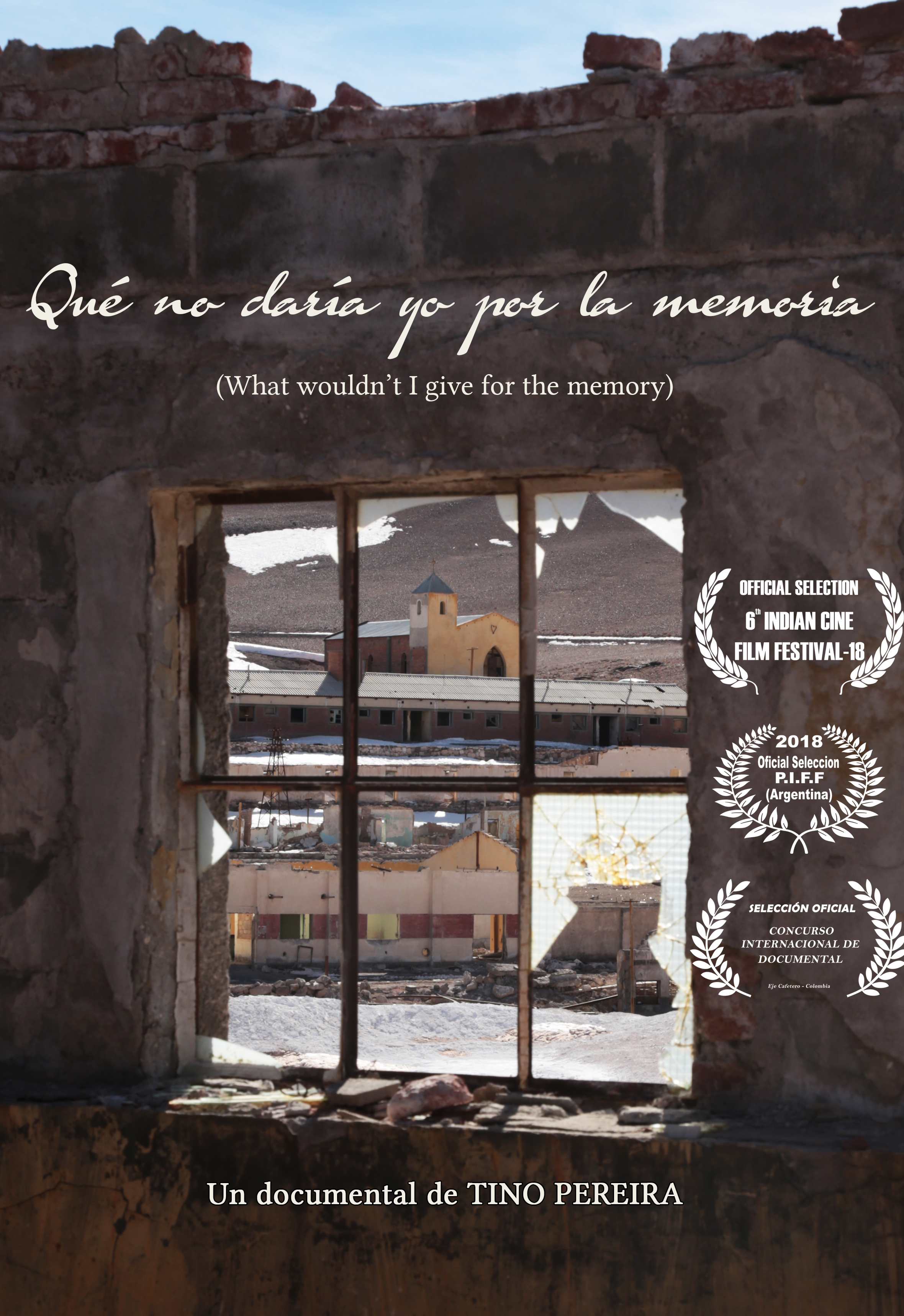 Afiche de la película